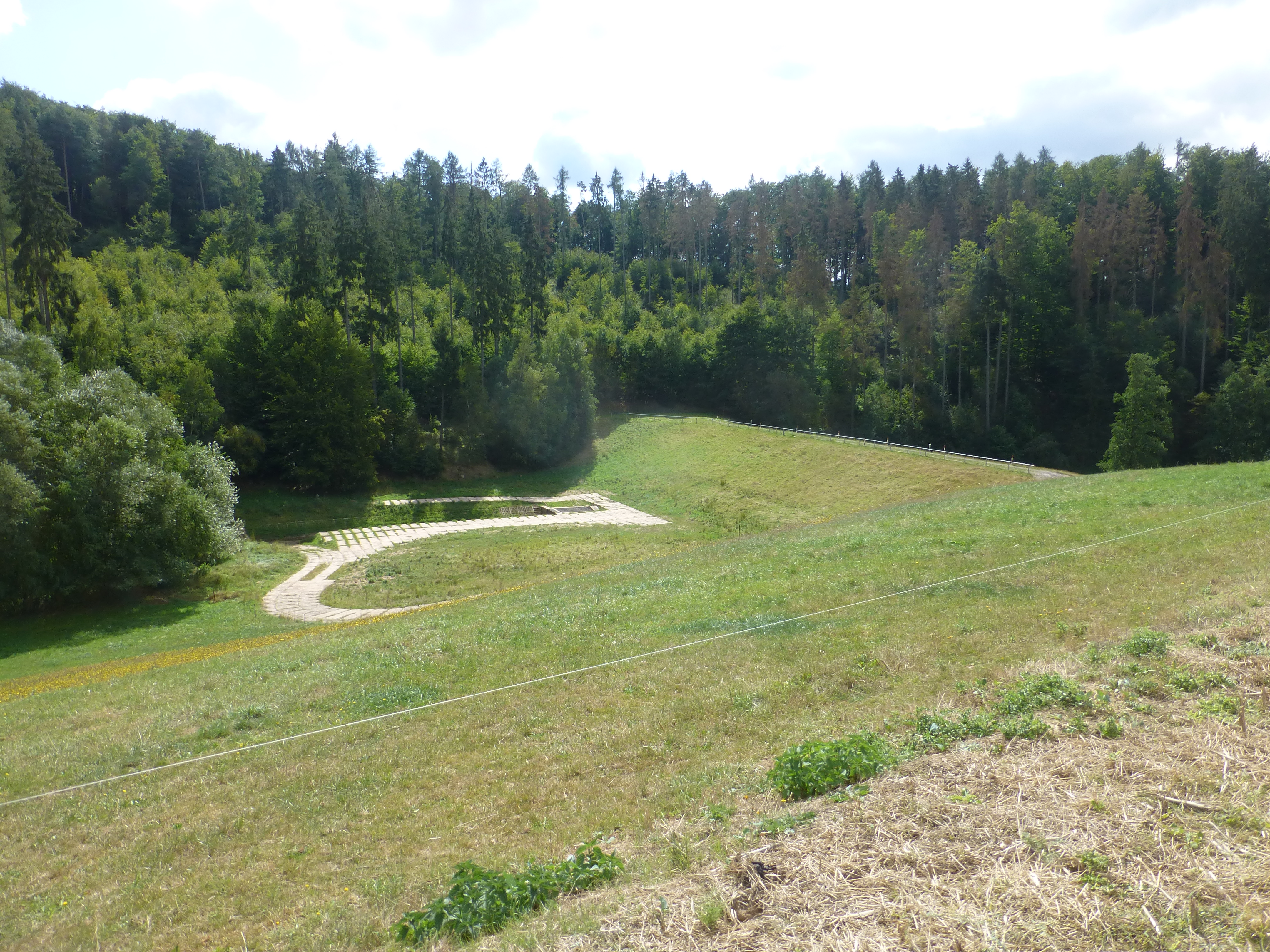 Hochwasserrückhaltebecken Mengelrode an der Beber, im Hintergrund der Beberberg